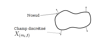 Milieu discrétisé (Schéma de principe)